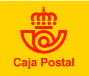 Antiguo logo de la Caja Postal de Ahorros (España)